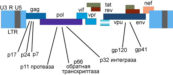 Геном ВИЧ.pngГеном ВИЧ